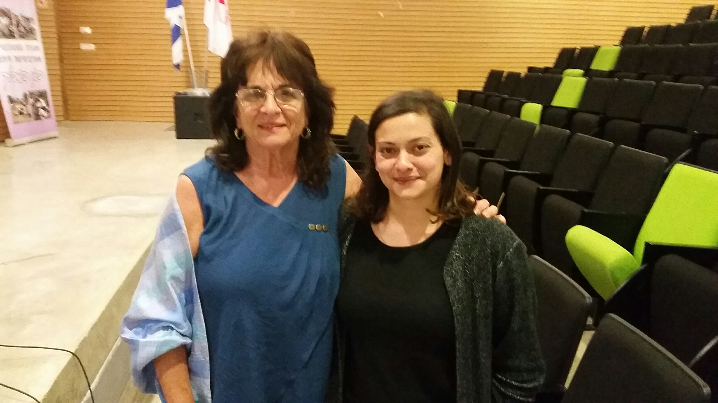 שאדן קנבורה ביחד עם עופרה רימון המנהלת לשעבר של מוזיאון הכט באירוע הקרנת הסרט "לא פה לא שם" באוניברסיטת חיפה